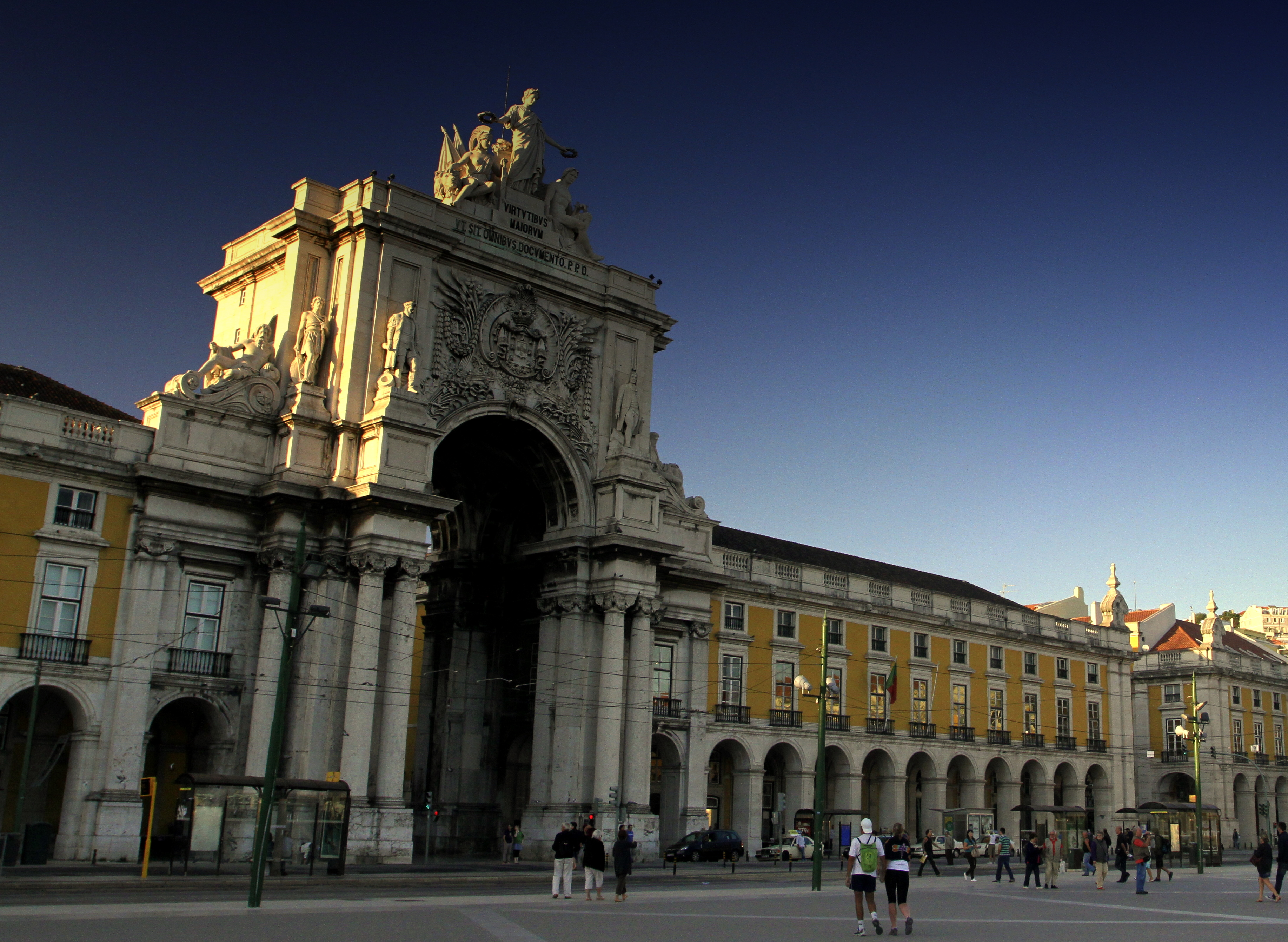 Arco da Rua Augusta